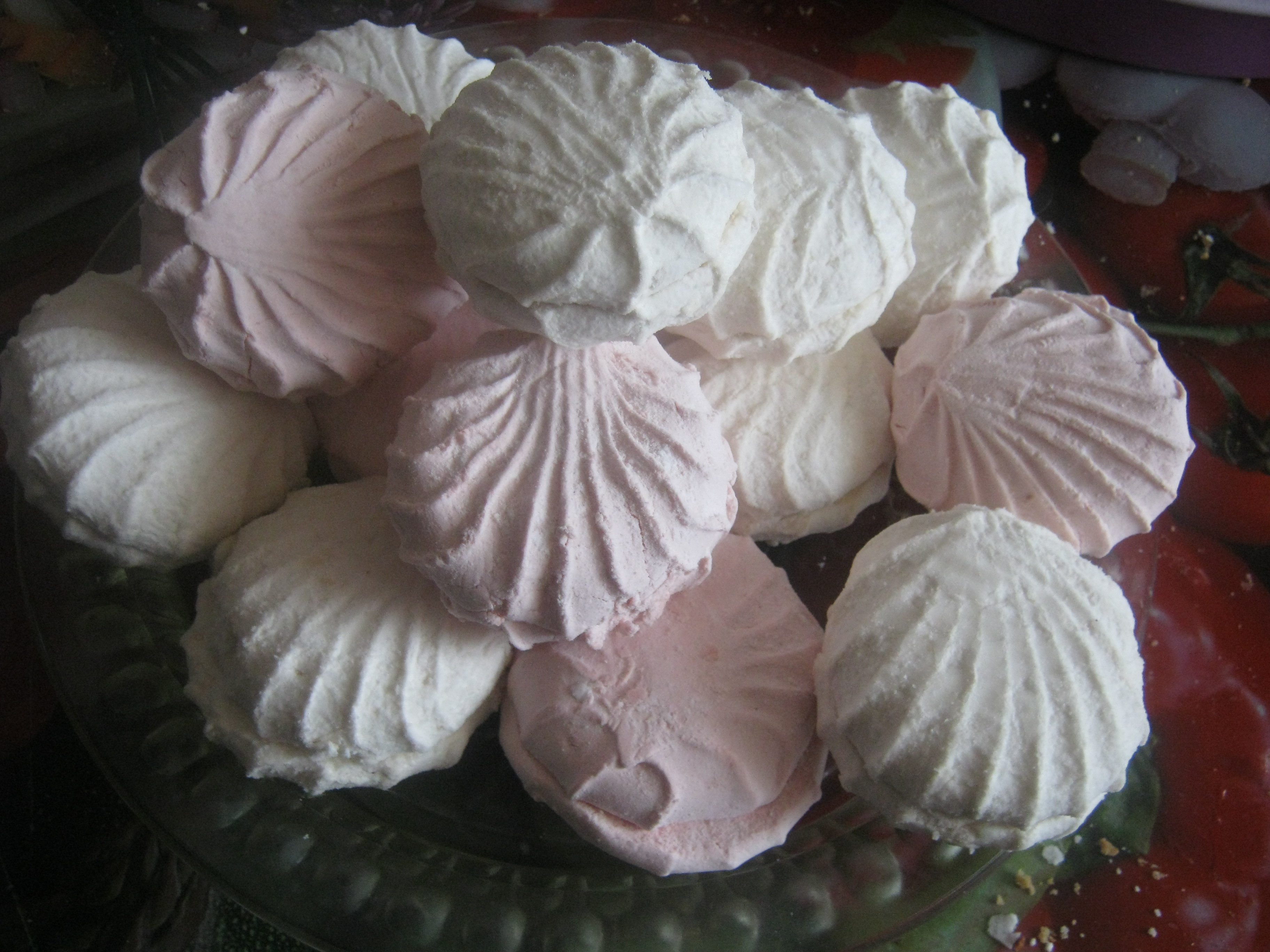 Zefyrai